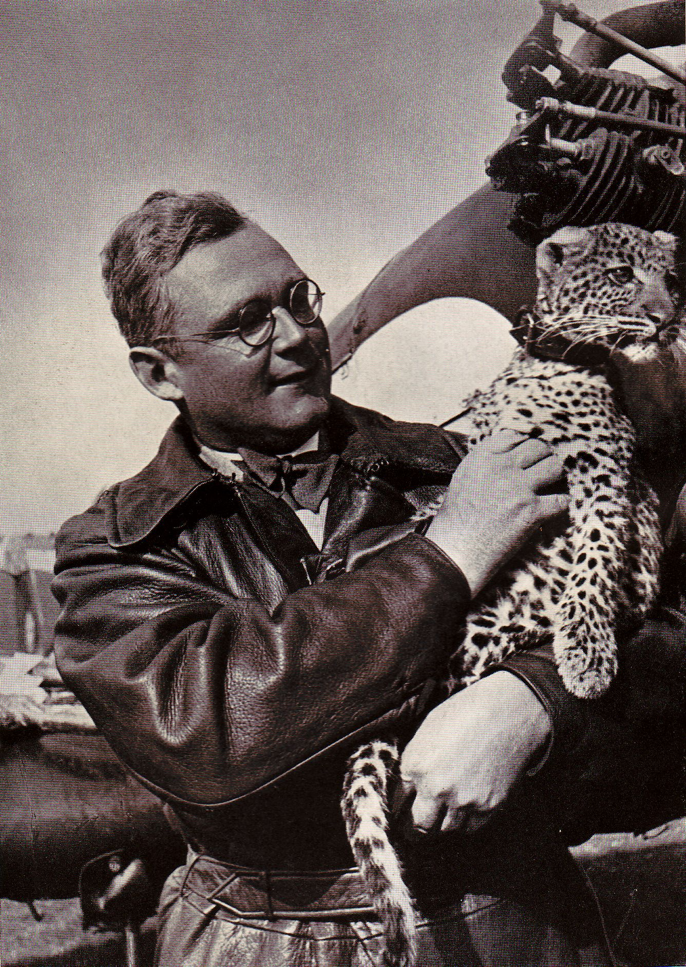 Karl Schwabe. Der Verfasser mit seinem Leoparden „Tanga“.